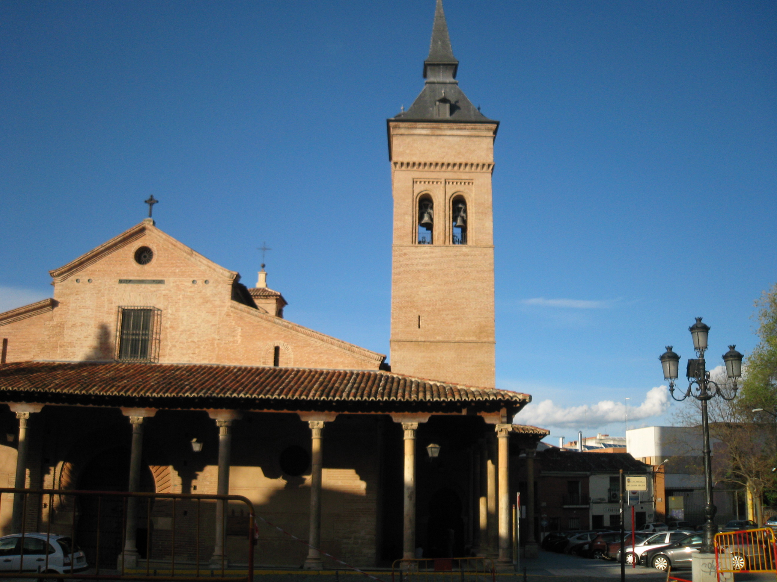 Concatedral de Santa María de Guadalajara in Guadalajara, Spain